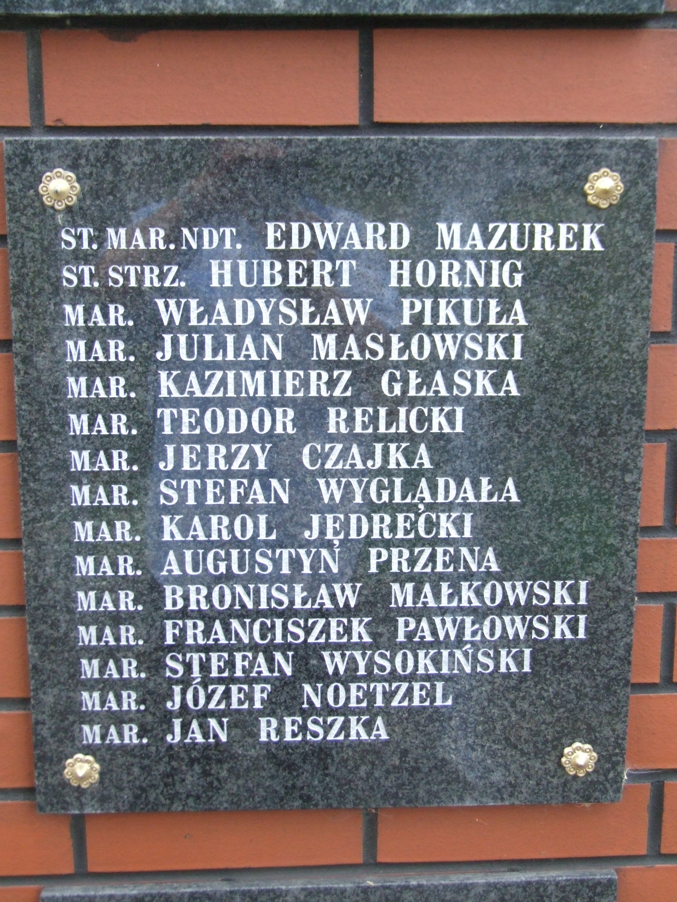 Gdynia-Oksywie Cmentarz Marynarki Wojennej